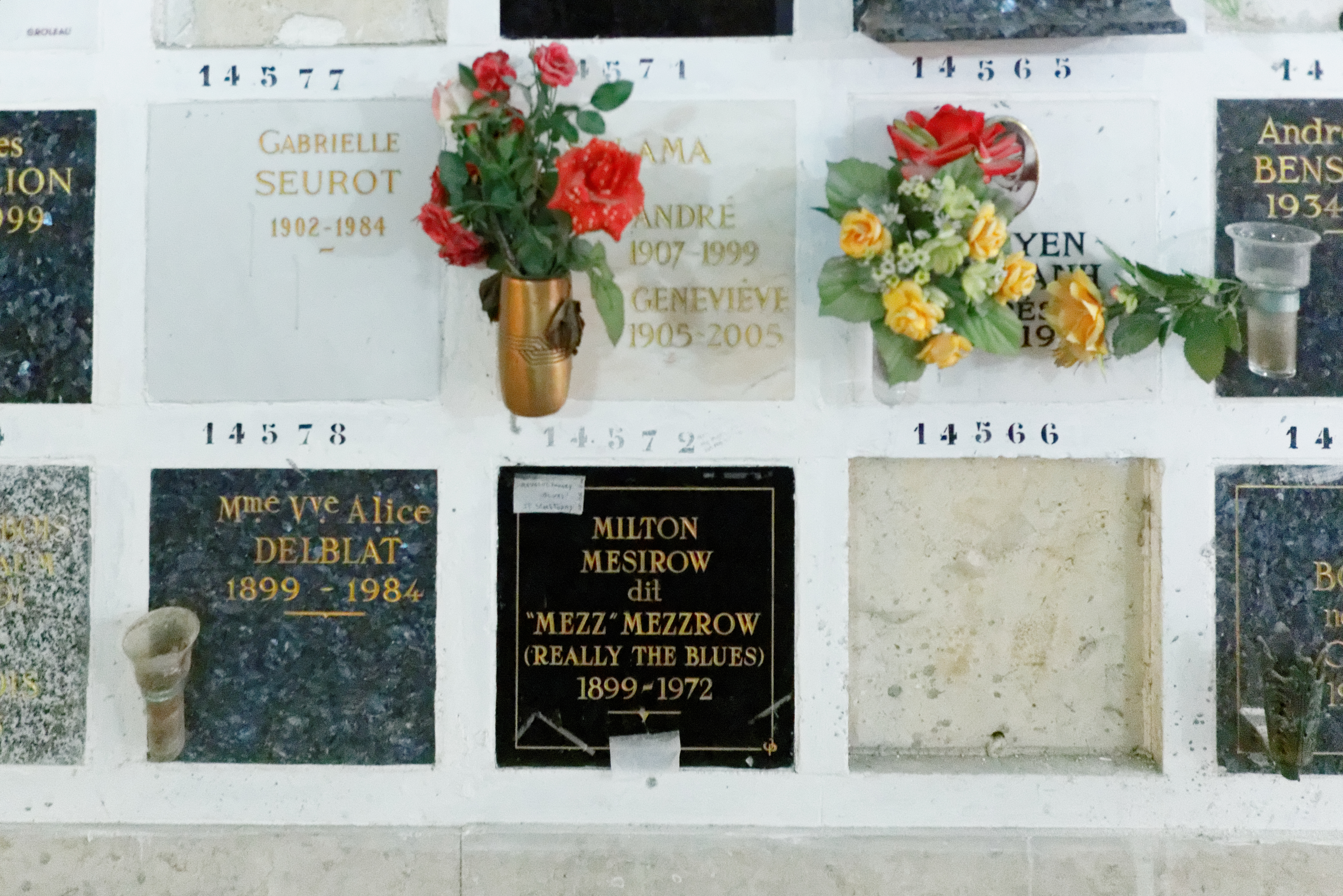 Cases du columbarium du cimetière du Père-Lachaise.